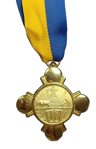 Condecoracion orden al merito en el trabajo primera clase